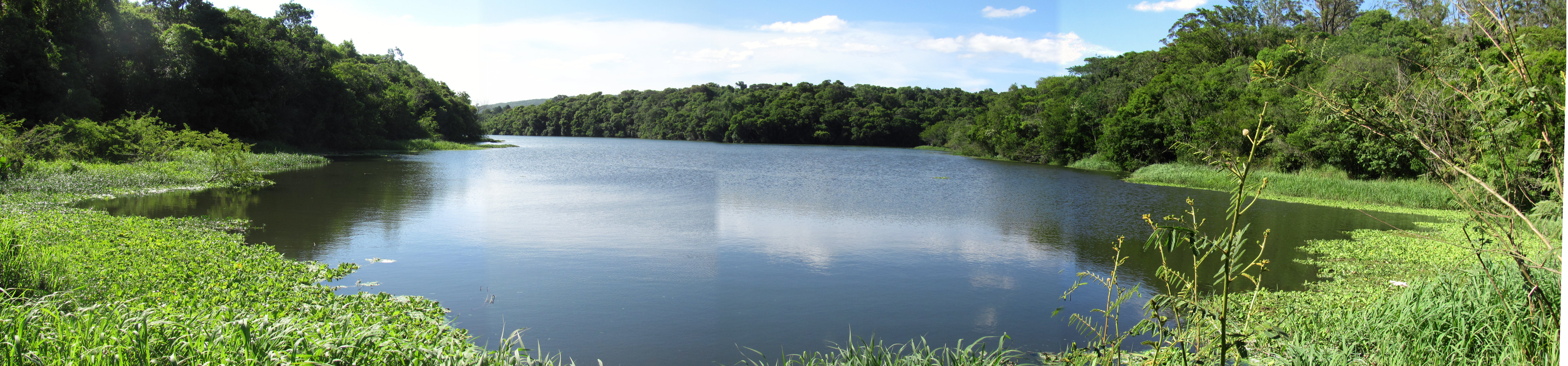 União de 4 fotos da Represa da Hidráulica no Parque Natural Municipal Saint-Hilaire